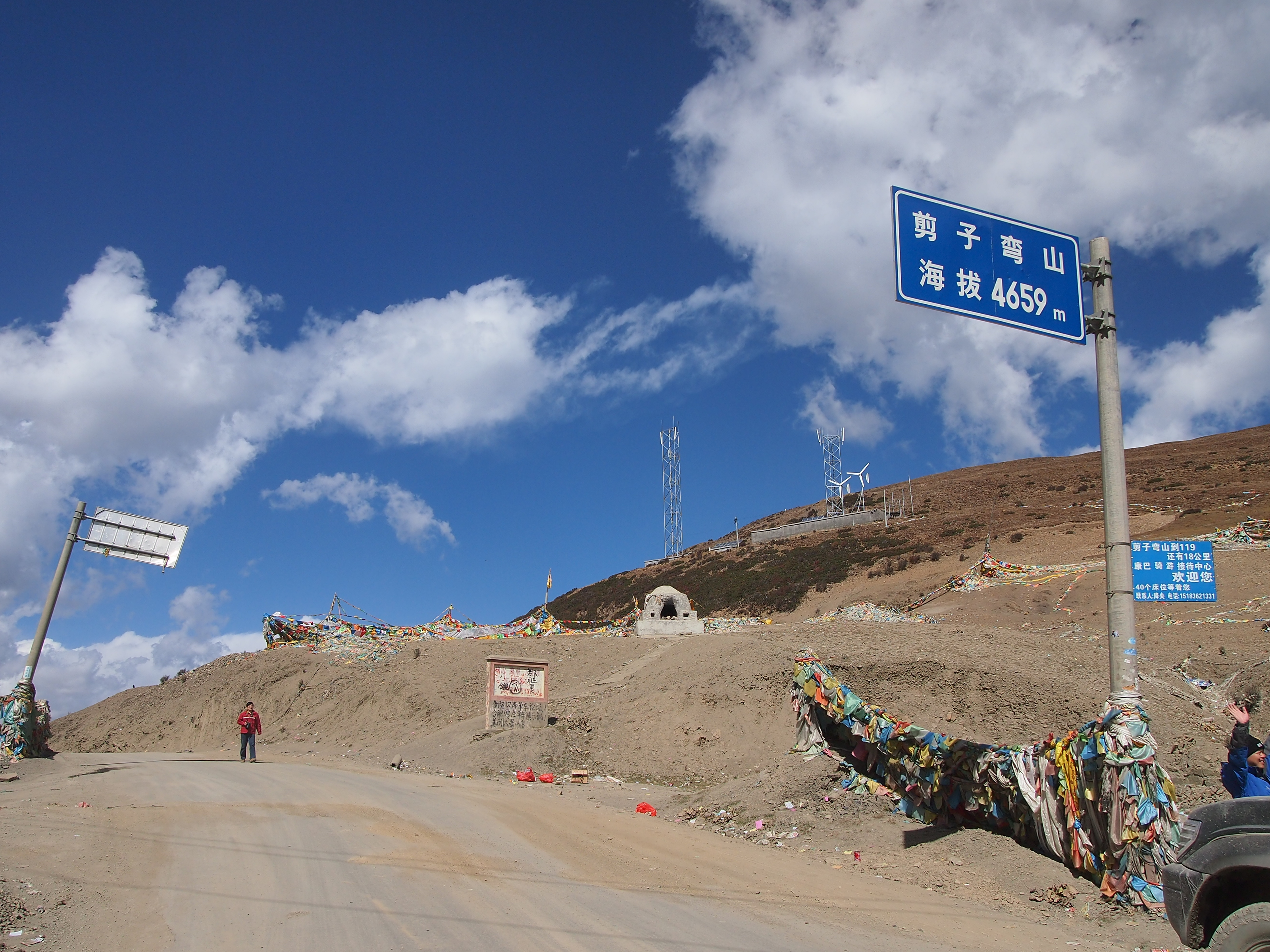 剪子弯山口 - Jianziwan Mountain Pass - 2012.10